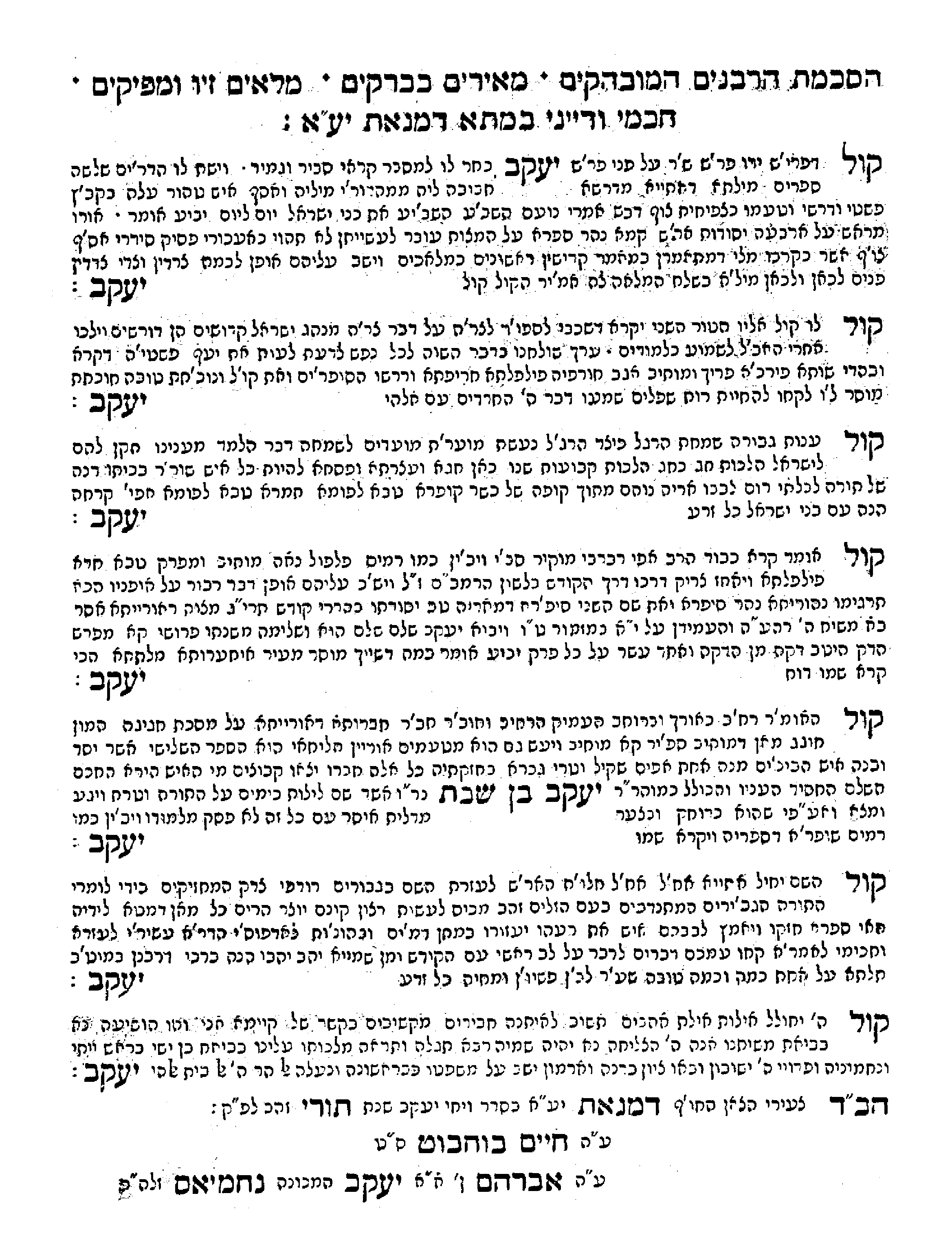 הסכמת חכמי דמנאת לספר רוח יעקב (משנת תרט"ז), לרבי יעקב בן שבת. הספר נדפס בליוורנו תרמ"א.